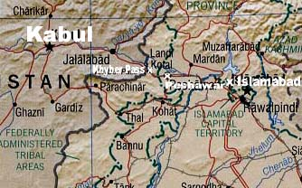 Kaart mam Khyber Pass.